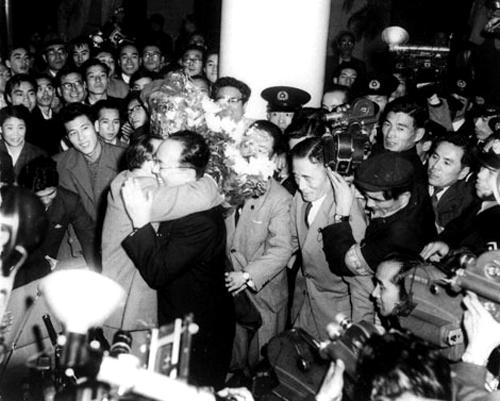 「一時亡命」先の中国・北京から三年ぶりに帰国した三代目中村翫右衛門（右・眼鏡）と出迎える四代目河原崎長十郎